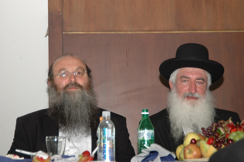 הרבנים יוסף טולדאנו (מימין) ומנחם בורשטין (משמאל) בישיבת מרכז הרב.